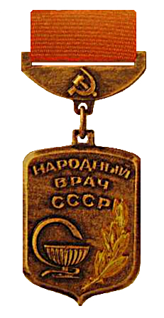 Знак «Народный врач СССР»